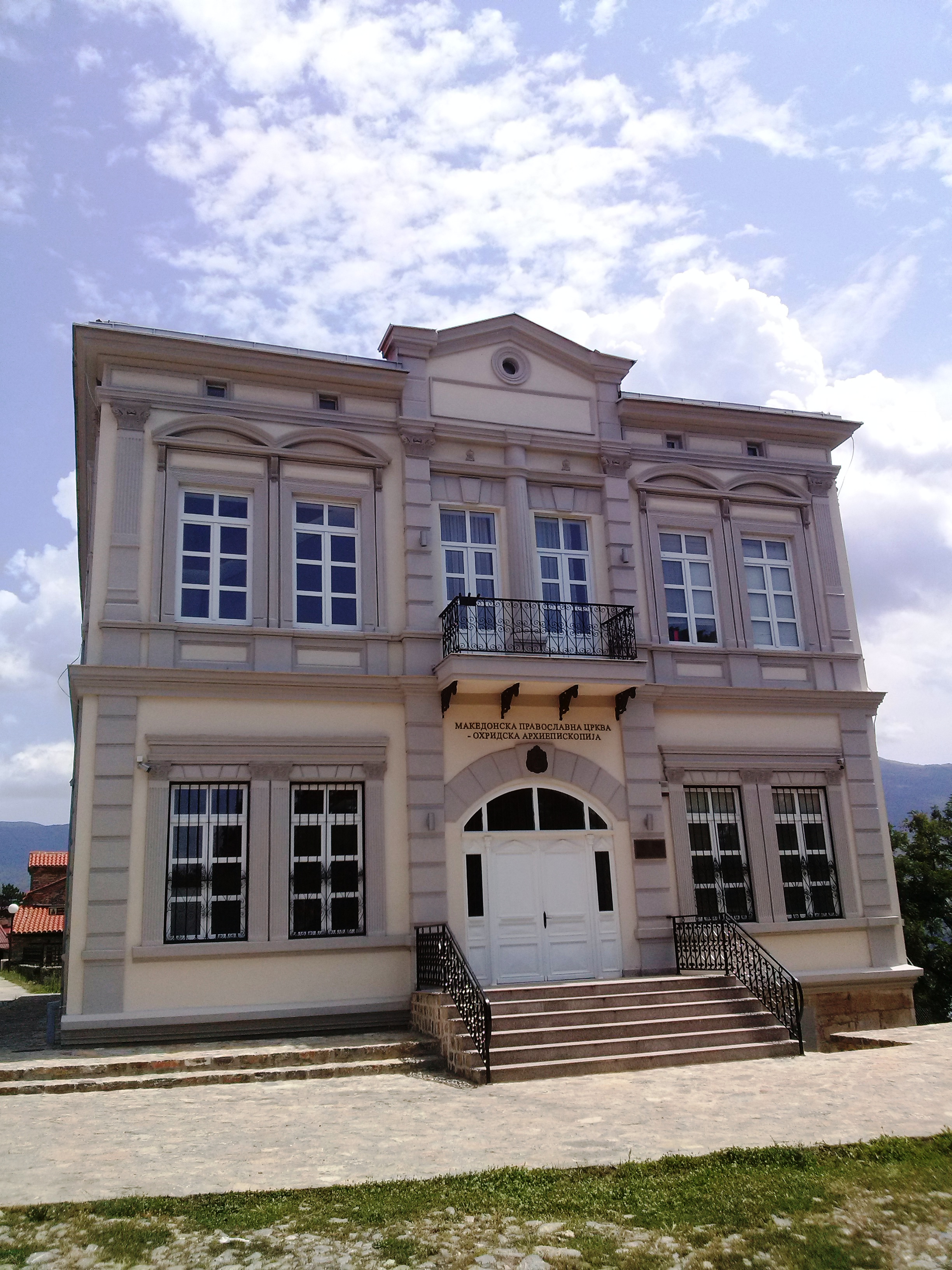 Македонска православна црква - Охридска архиепископија